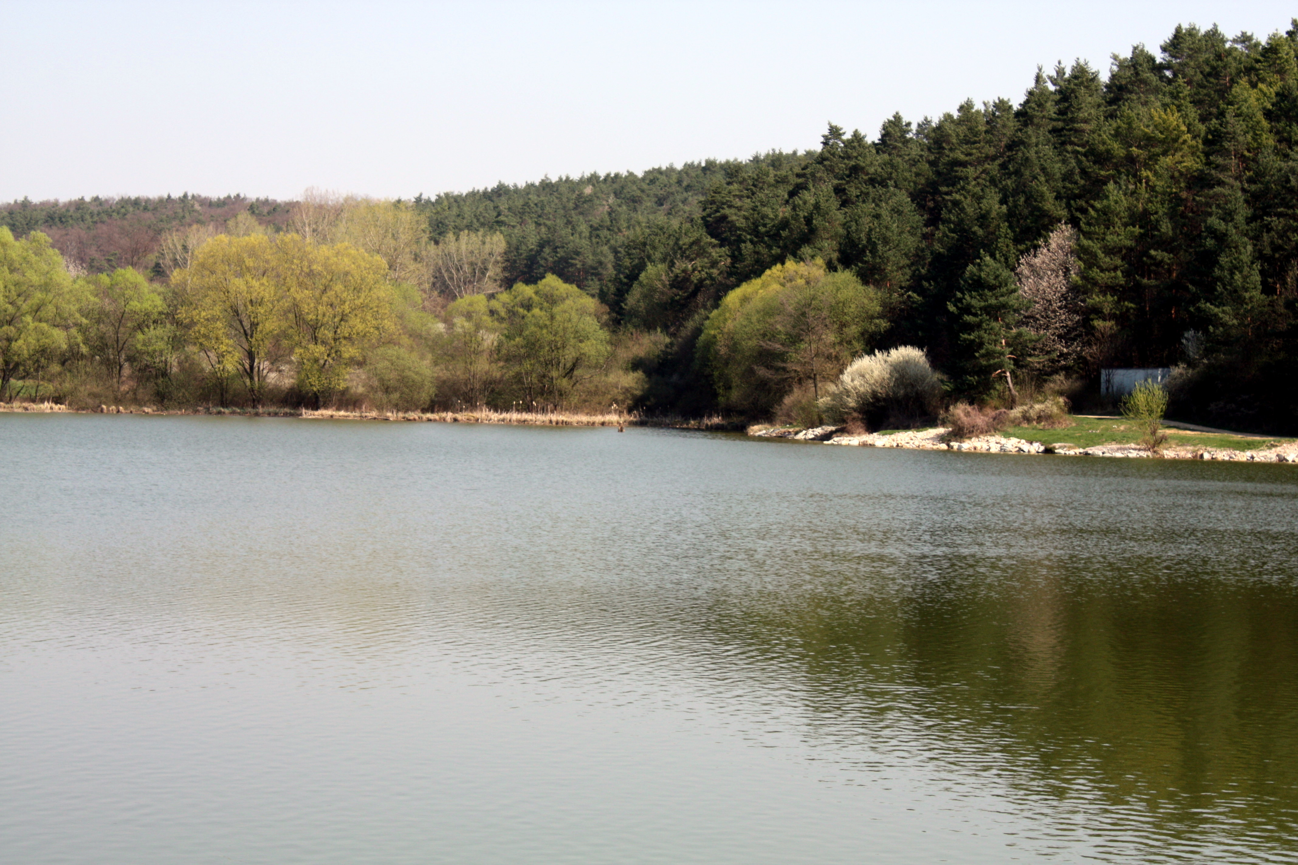 Tesáre - oproti hrádzi